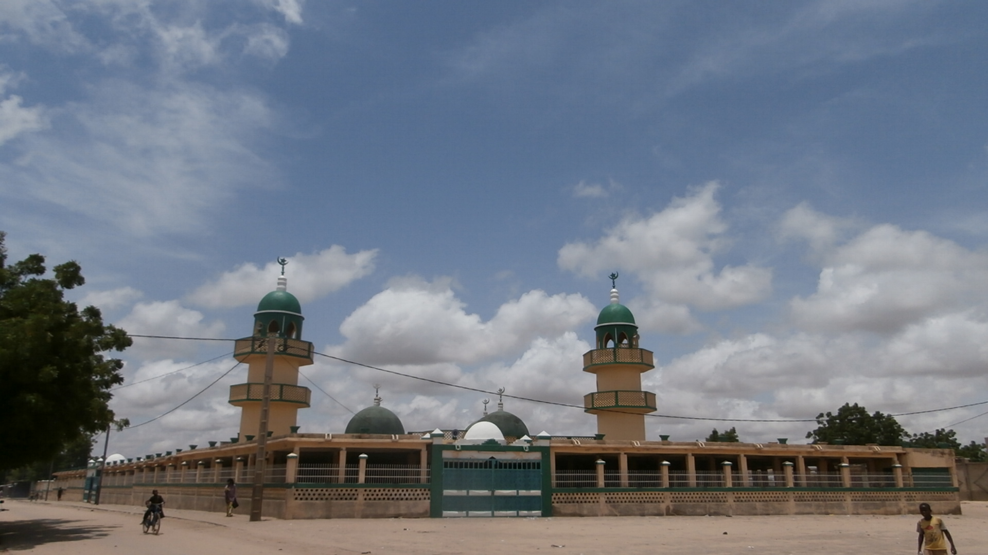 Mosqué du Sultanat de katchina de Maradi